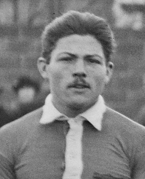 [Football] association, 28/11/20, Charentonneau, équipe Olympique.